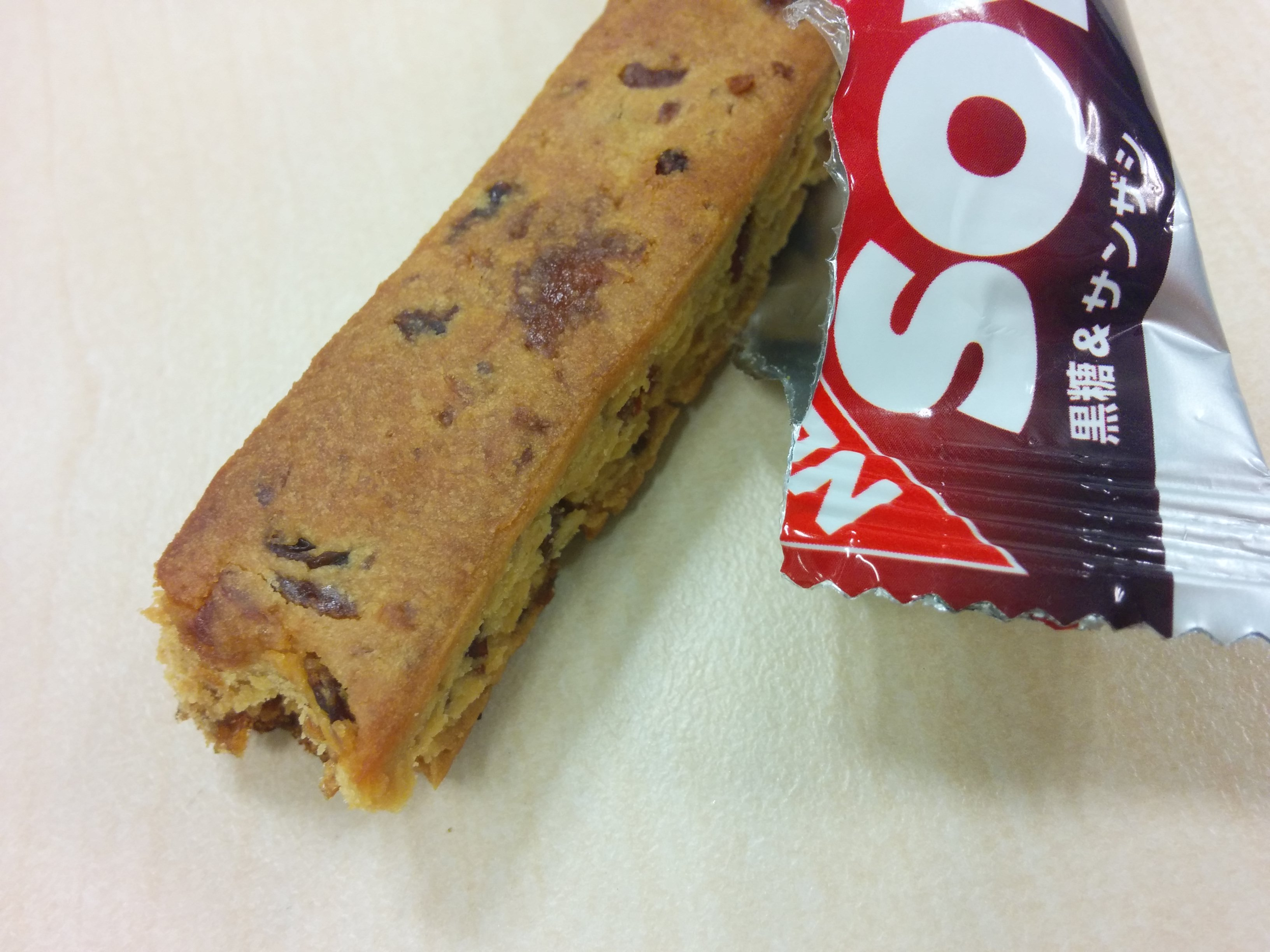 Soyjoy brand